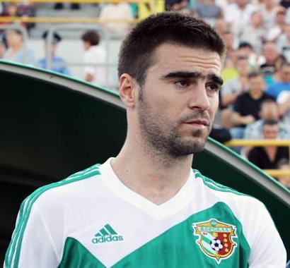 Ахмед Янузі — український футболіст, нападник Ворскли